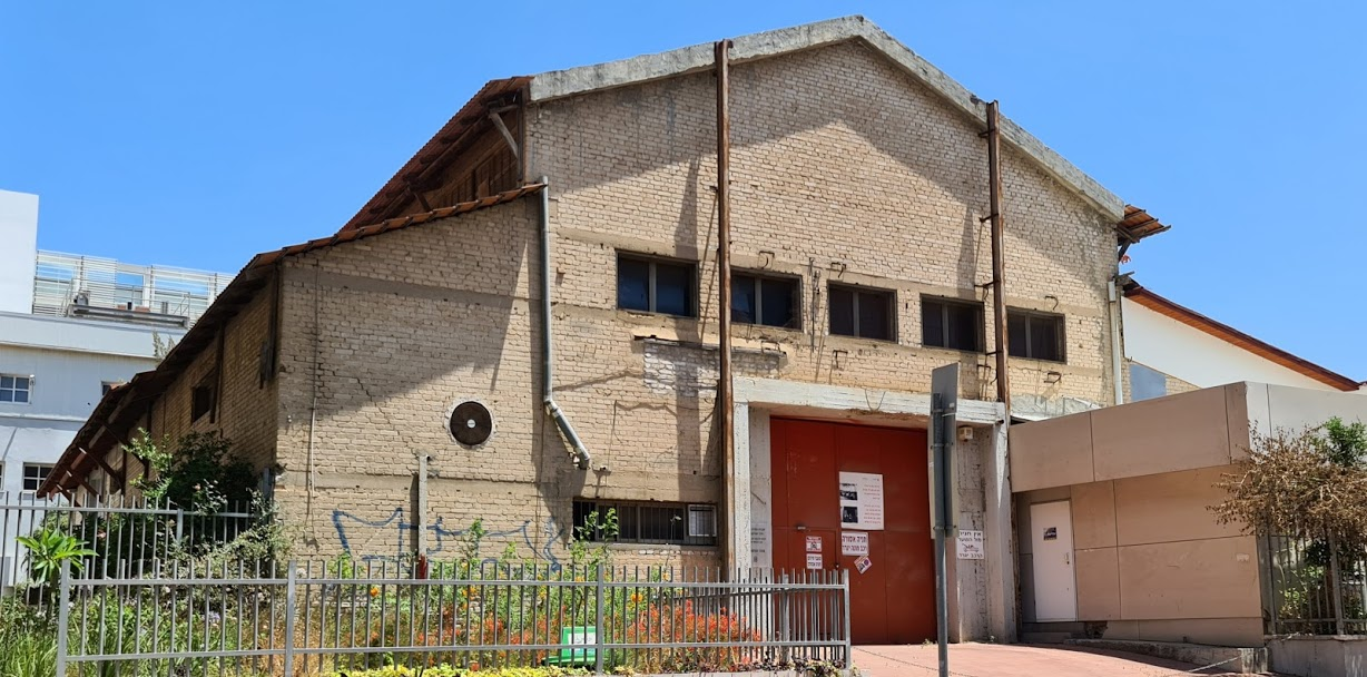 בית האריזה לתפוזים נבנה על ידי יצחק לייב גולדברג כחלק מפרדס גולדברג. הפרדס השתרע על שטחי שכונת חרוזים והחווה החקלאית למרגלות גבעת נפוליאון. הבנין הנמצא ברחוב ידע עם משמש כיום את מכללת שנקר